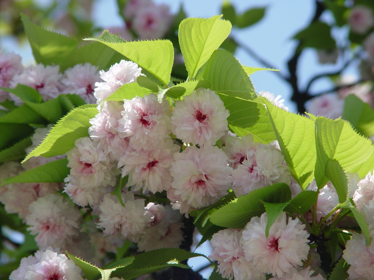 Kenrokuen Kikuzakura